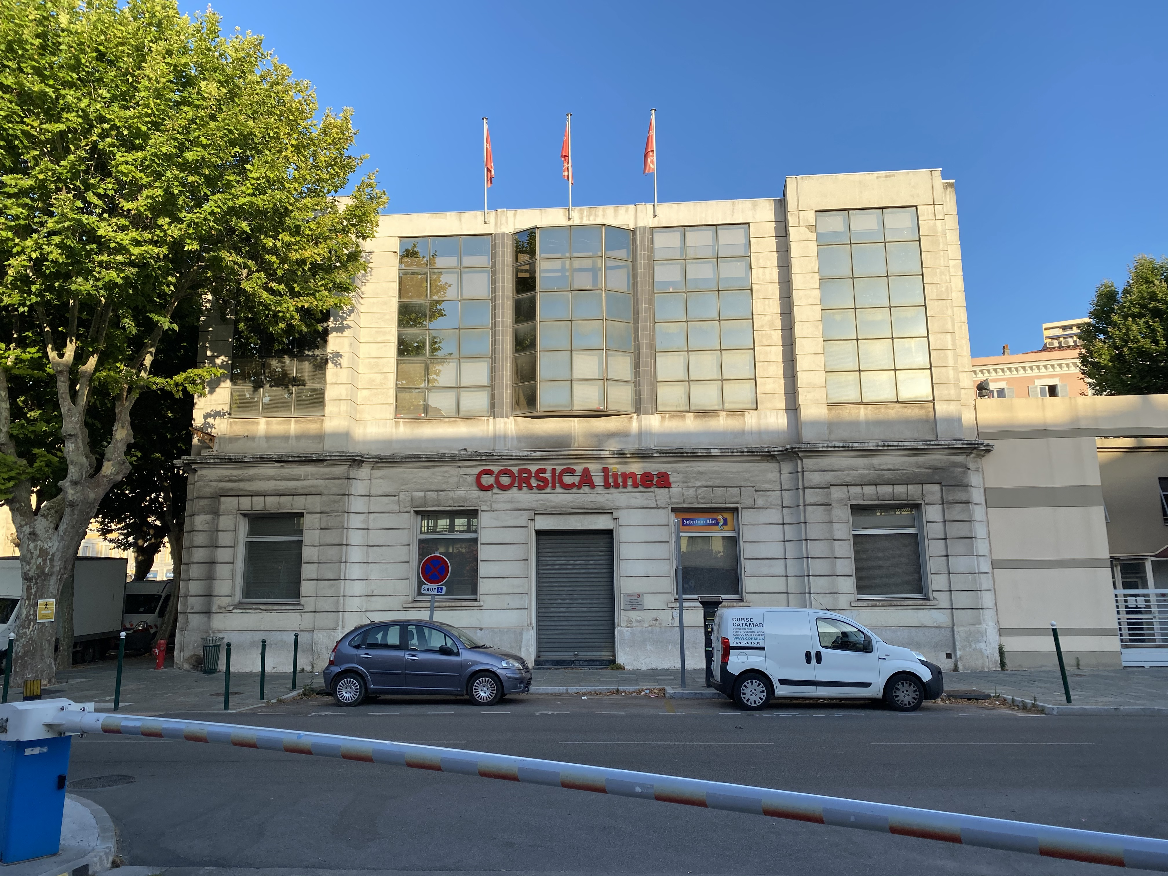 Façade du bâtiment abritant le siège social de Corsica Linea à Ajaccio.